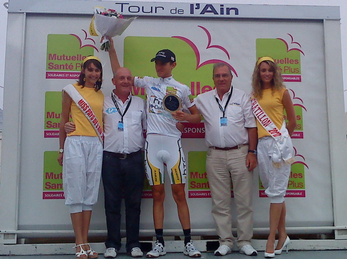 Classement final du Tour de l'Ain 2010 : maillot blanc remporté par Tejay Van Garderen.